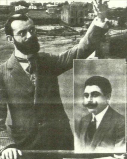 Dalmacio Iglesias representado en San Feliu de Llobregat.